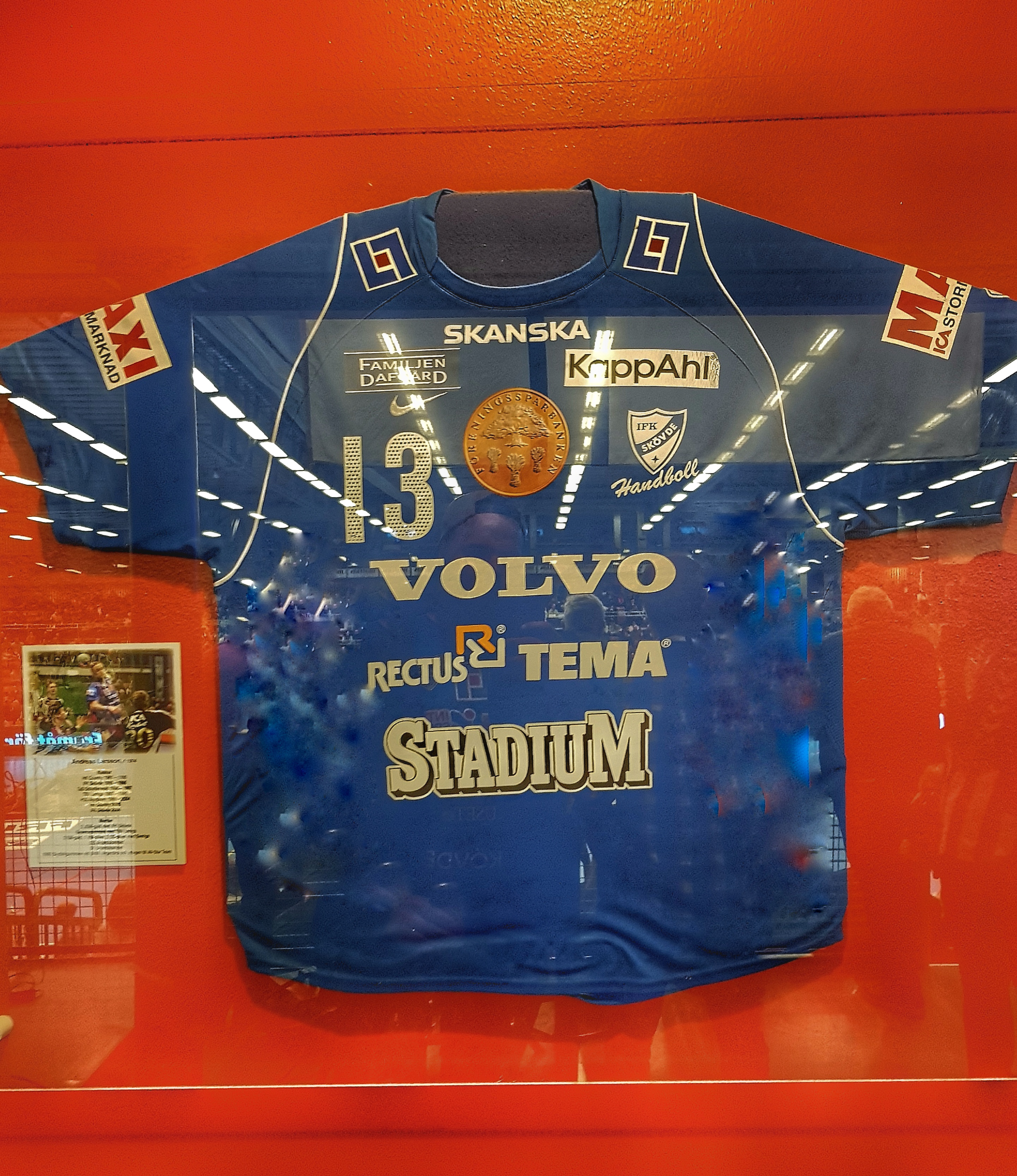 Andreas Larsson pensionerade tröja nummer 13 i Arena Skövde